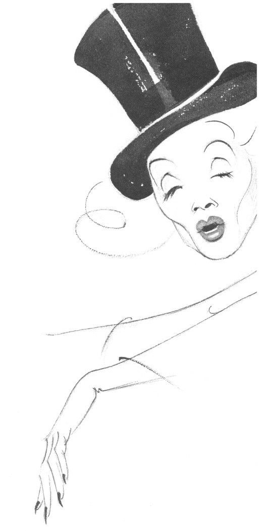 Karikatur der Schauspielerin Marlene Dietrich